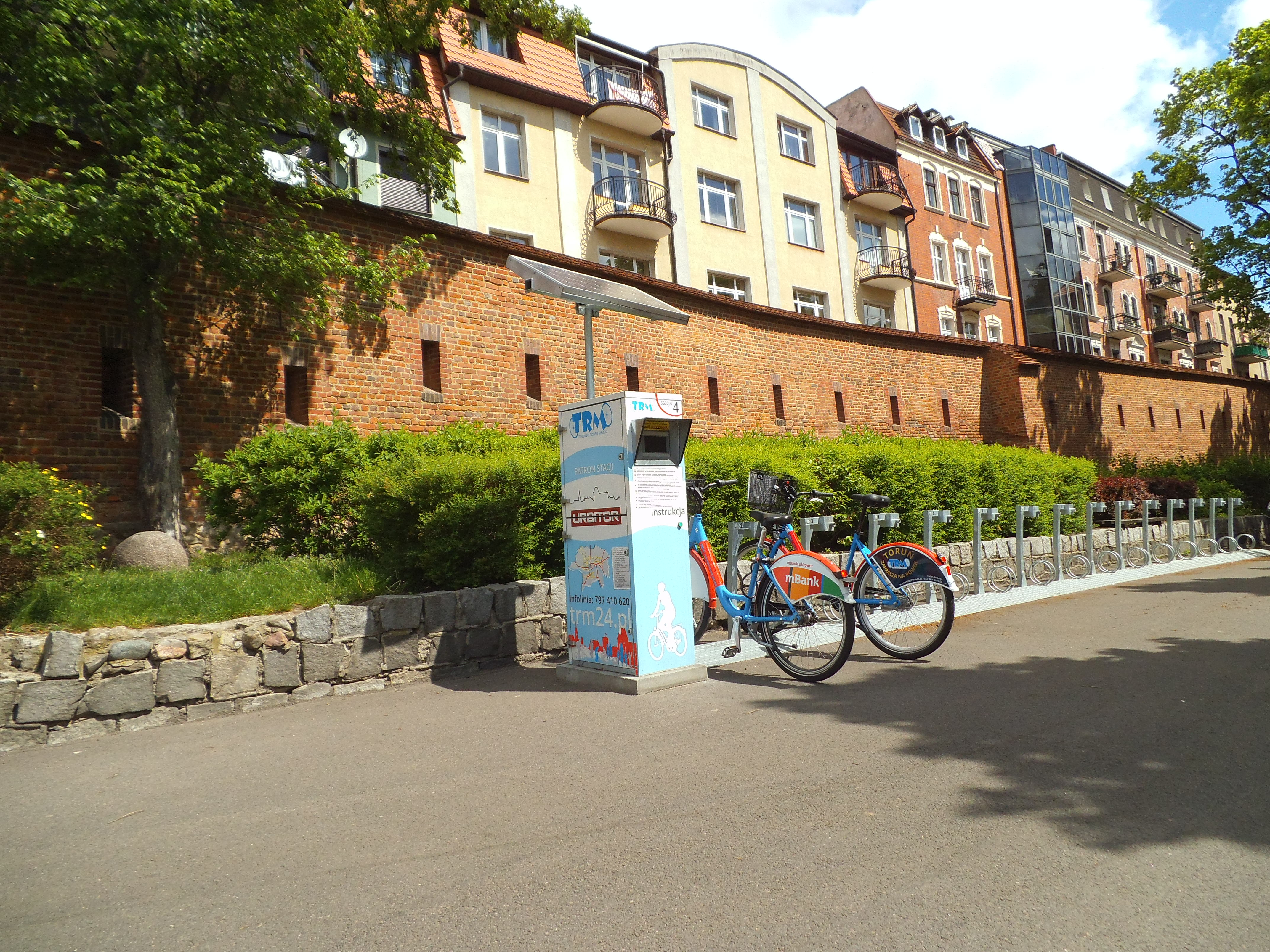 Mury Starego Miasta w Toruniu1